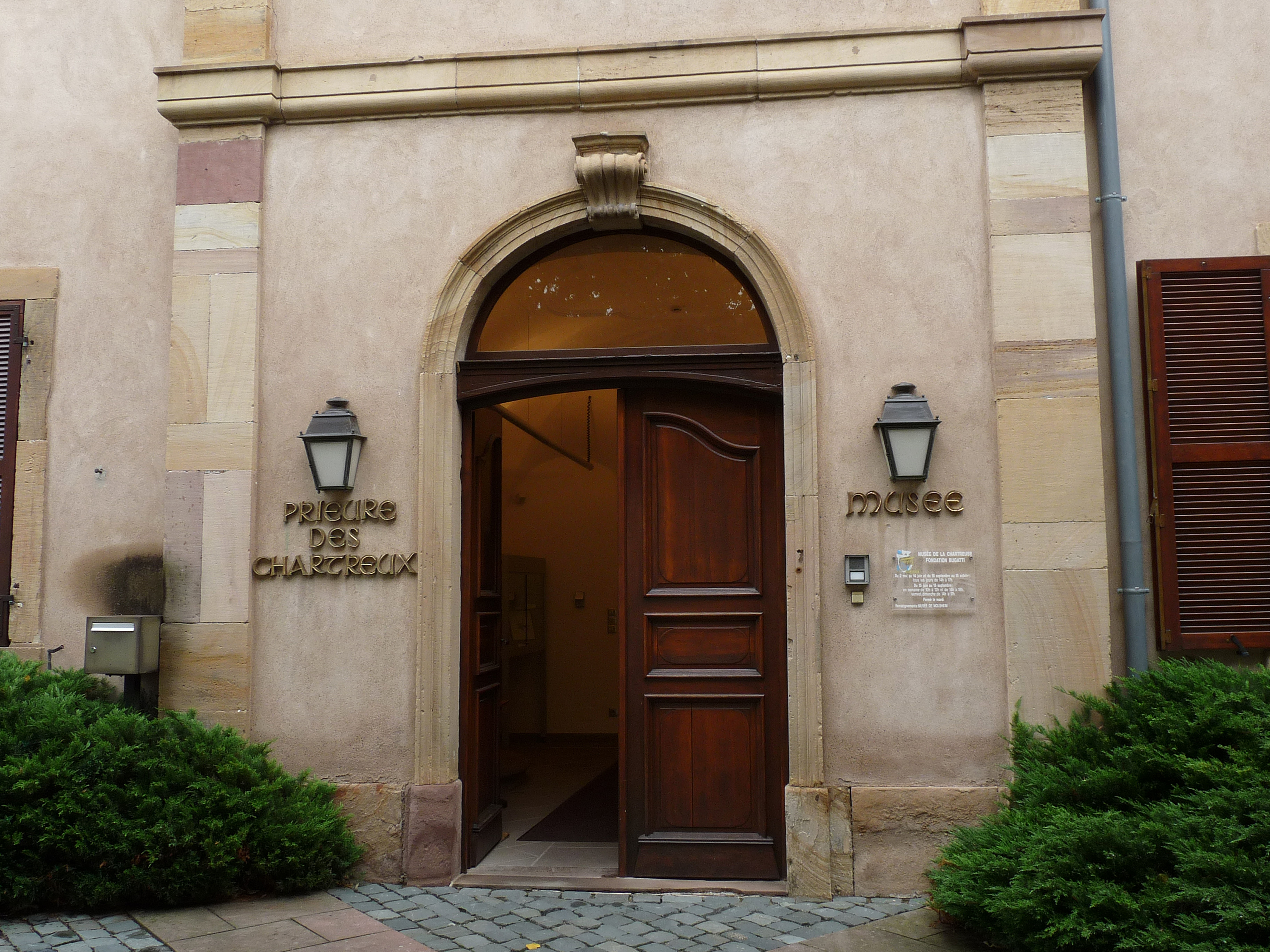 Chartreuse de Molsheim (Bas-Rhin)